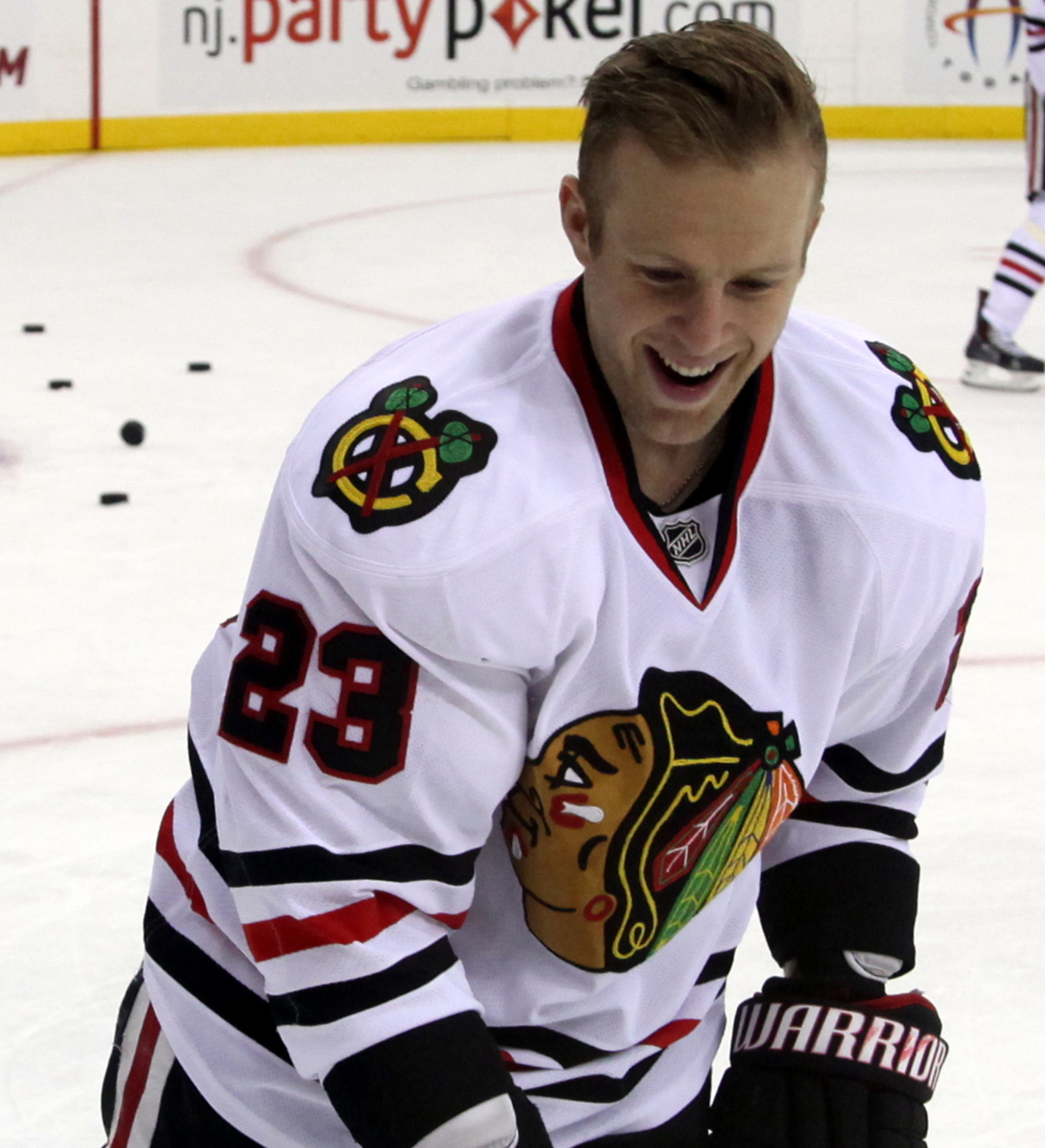 Kris Versteeg in December 2014.